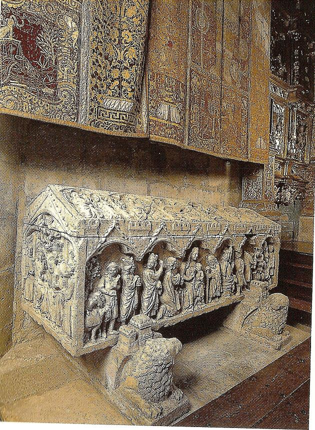 Sepulcro de la infanta Berenguela de Castilla (1228-1279), hija de Fernando III el Santo y de la reina Beatriz de Suabia. (Monasterio de las Huelgas de Burgos).